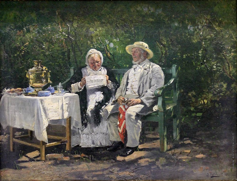 Старички (Чаепитие) Год создания 1881 Материал Холст, масло Собрание Национальный художественный музей Республики Беларусь